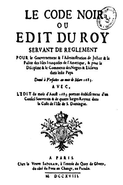 Louis XIV de France, Louis XV de France, Le Code Noir ou Edit du Roi Servant de reglement pour le Gouvernement & l'Administration de l'Amerique, & pour la Discipline & le commerce des Negres & Esclaves dans ledit Pays. Donné à Versailles au moins de Mars 1685. Avec l'Edit du mois d'Aoust 1685 portant établissement d'un Conseil Souverain & de quatre Siège Royaux dans la Coste de l'Isle de S. Domingue. A Paris. Chez la Veuve Saugrain, à l'entrée du Quay de Gêvres, du côté du Pont au Change, au Paradis. M. DCCXVIII (1718).